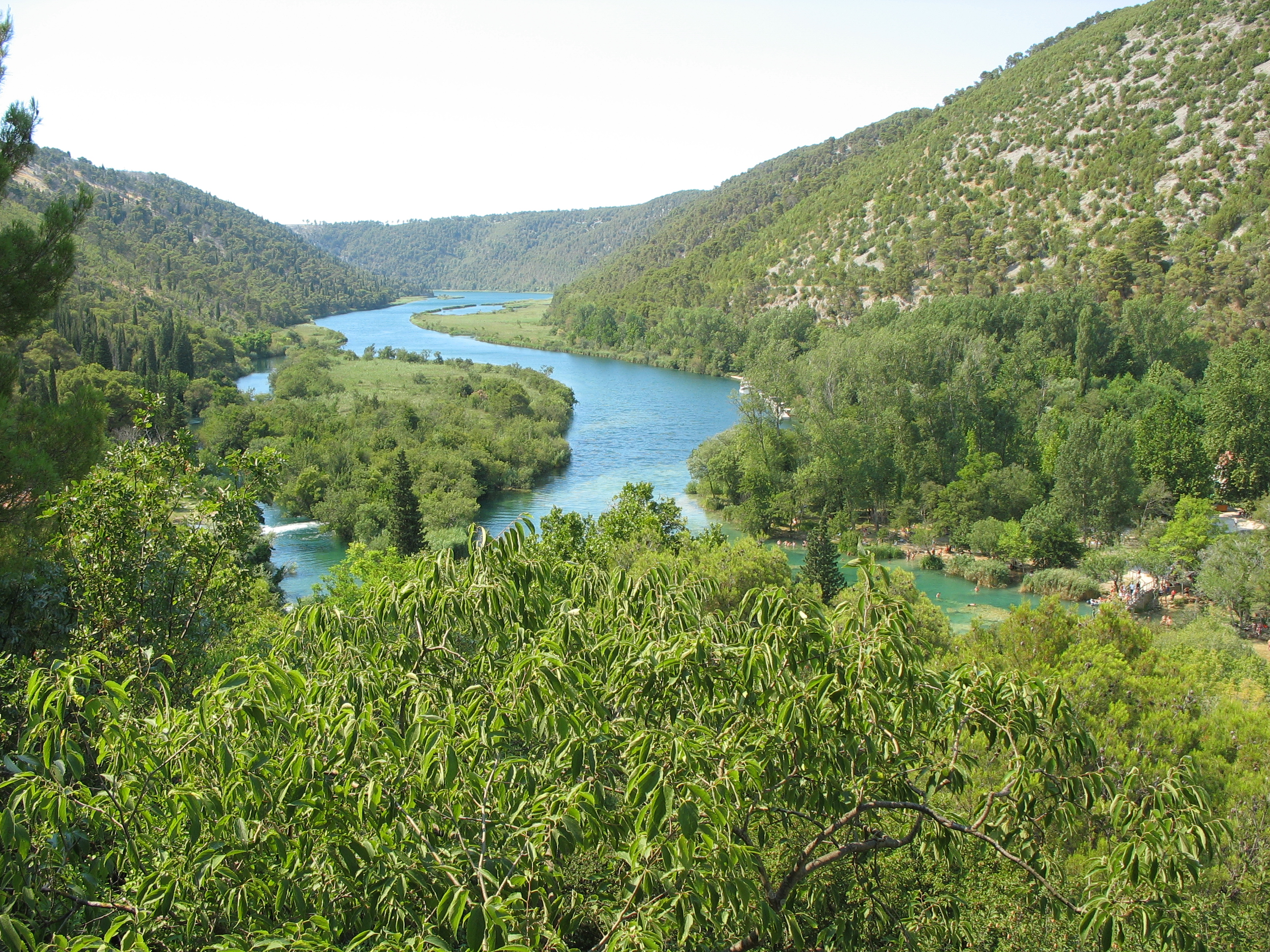 Rijeka Krka kod Skradinskog buka.